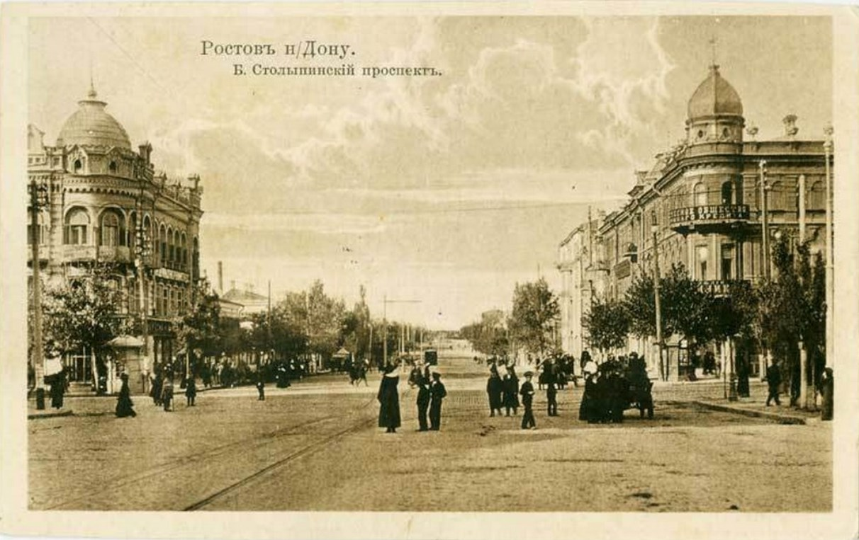 Большой Столыпинский проспект в Ростове-на-Дону на дореволюционной открытке. Сейчас — Ворошиловский проспект.